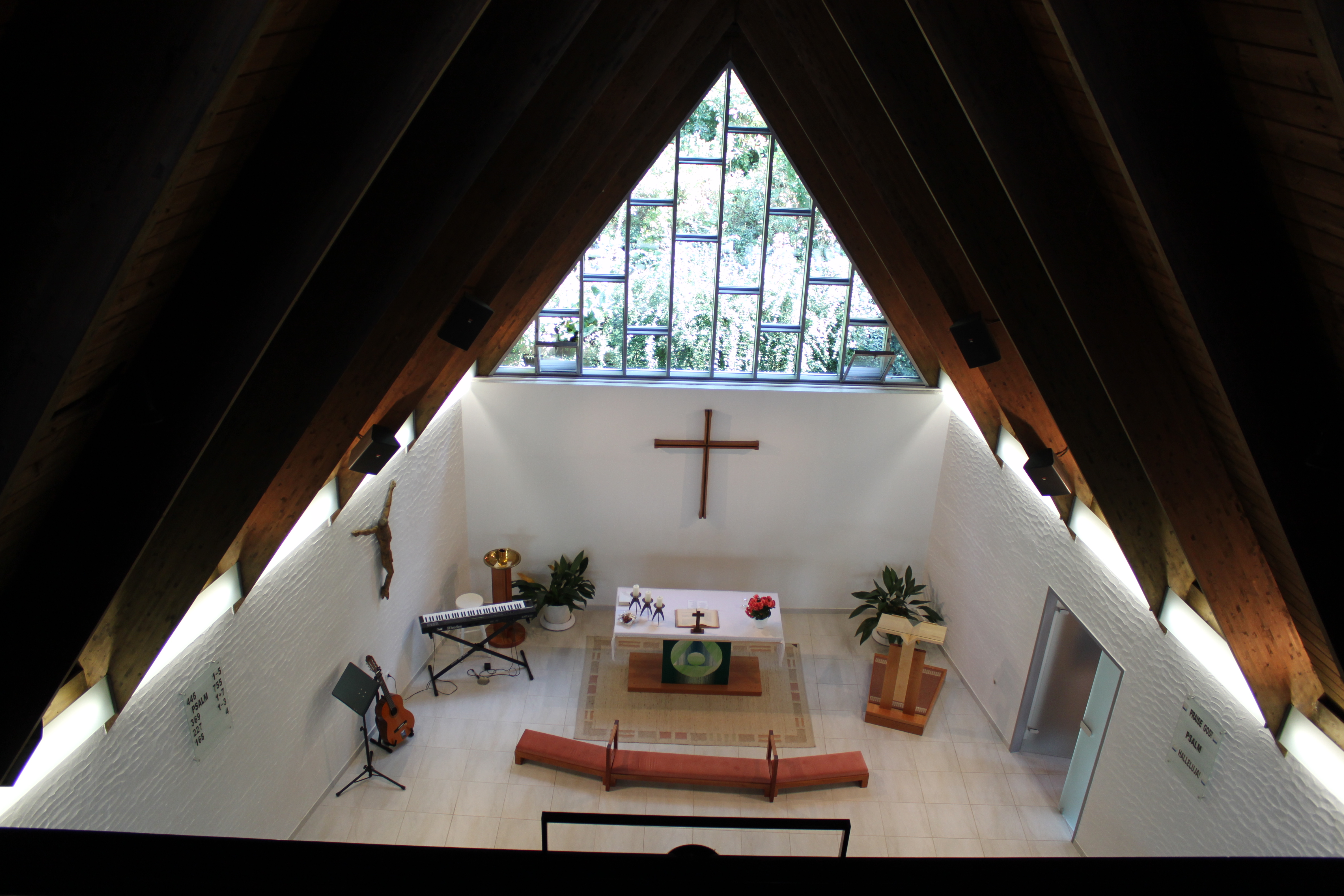 Innenraum der Trinitatiskirche in Hütteldorf (Wien-Penzing) von der Empore betrachtet